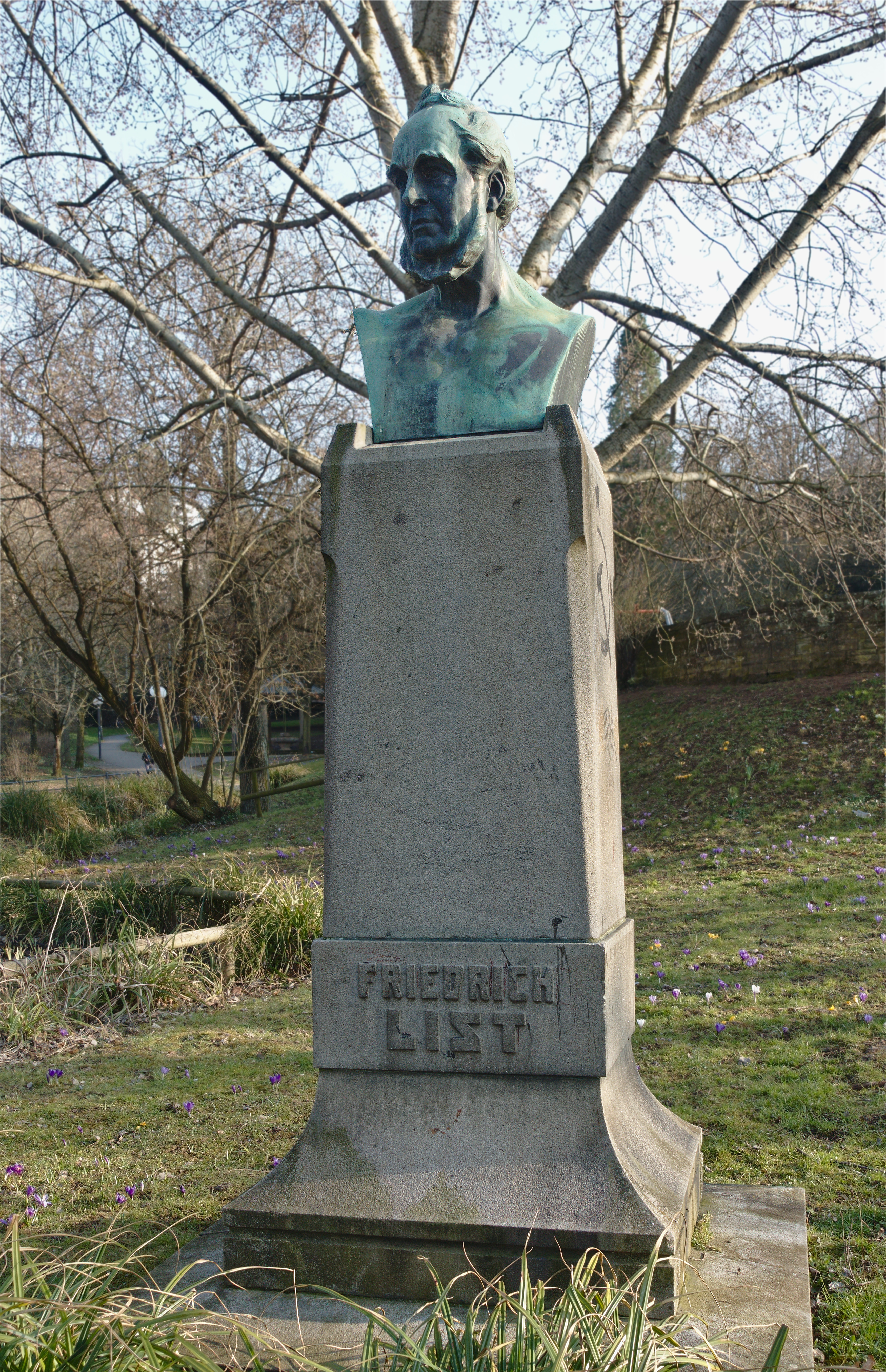 Friedrich-List-Denkmal (Teil der SG „Bopser-Anlagen“). Bildhauer: Daniel Stocker, 1905. Geschützt nach § 2 DSchG